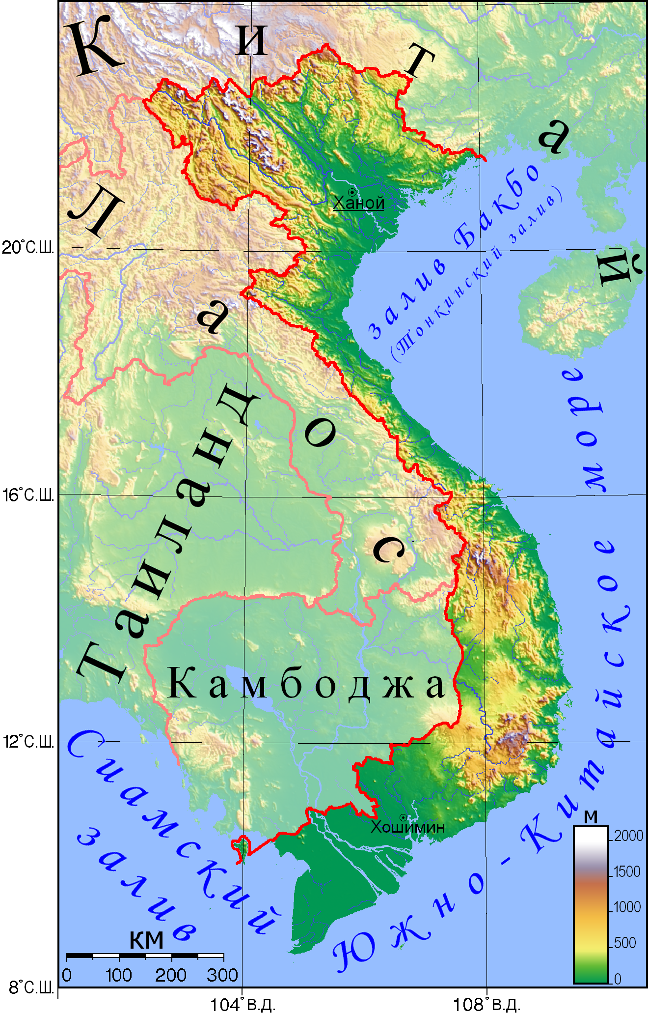 рельеф Вьетнама